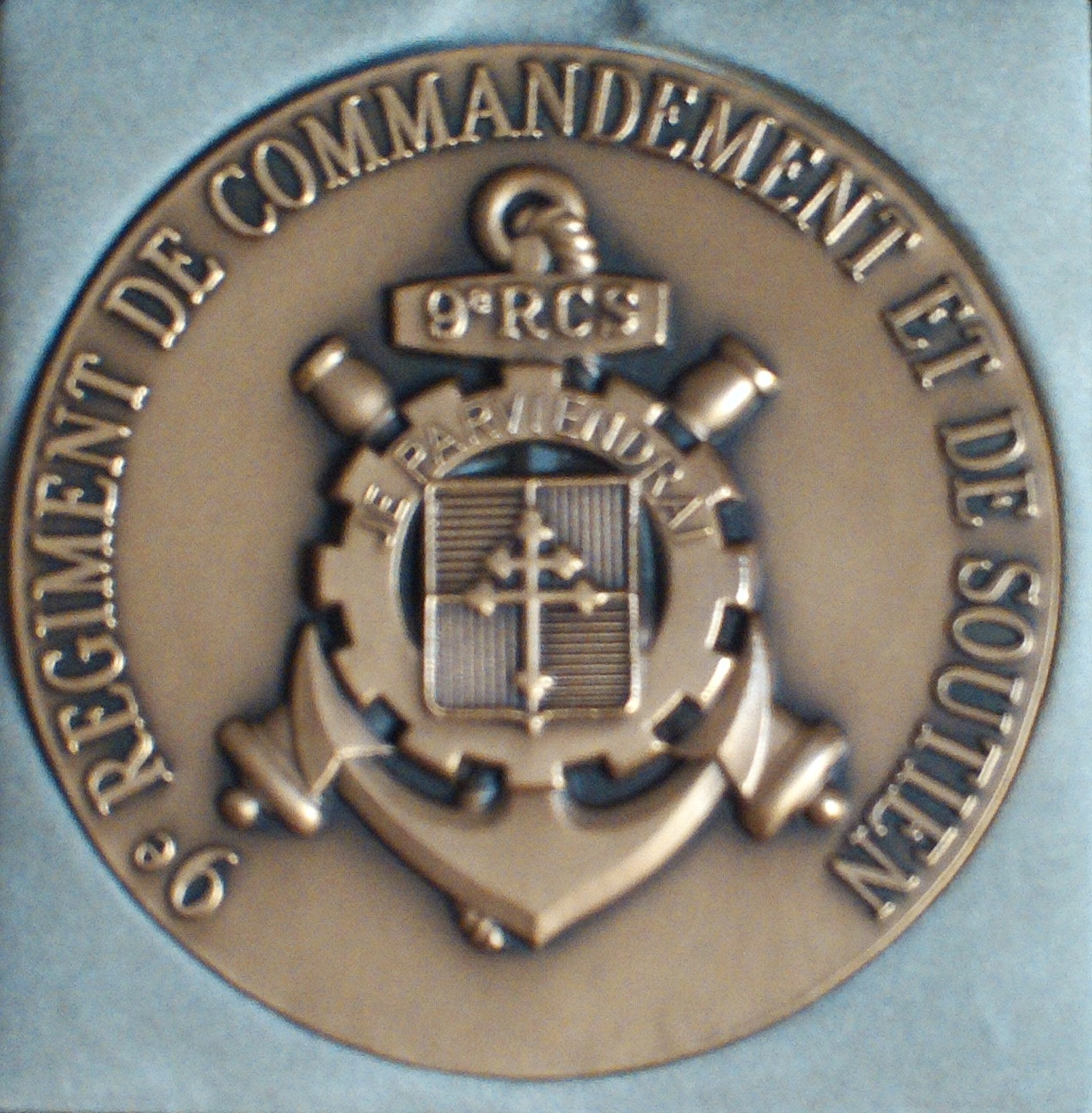 insigne du 9ième Régiment de Commandement et de Soutien